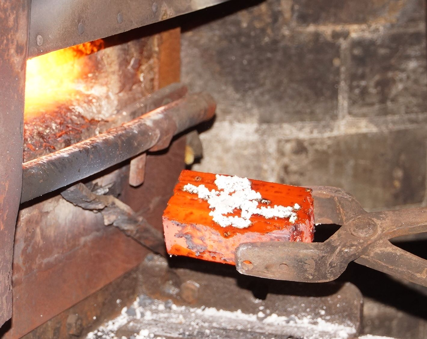 Schmieden von Damaszener Stahl im LVR-Industriemuseum Solingen